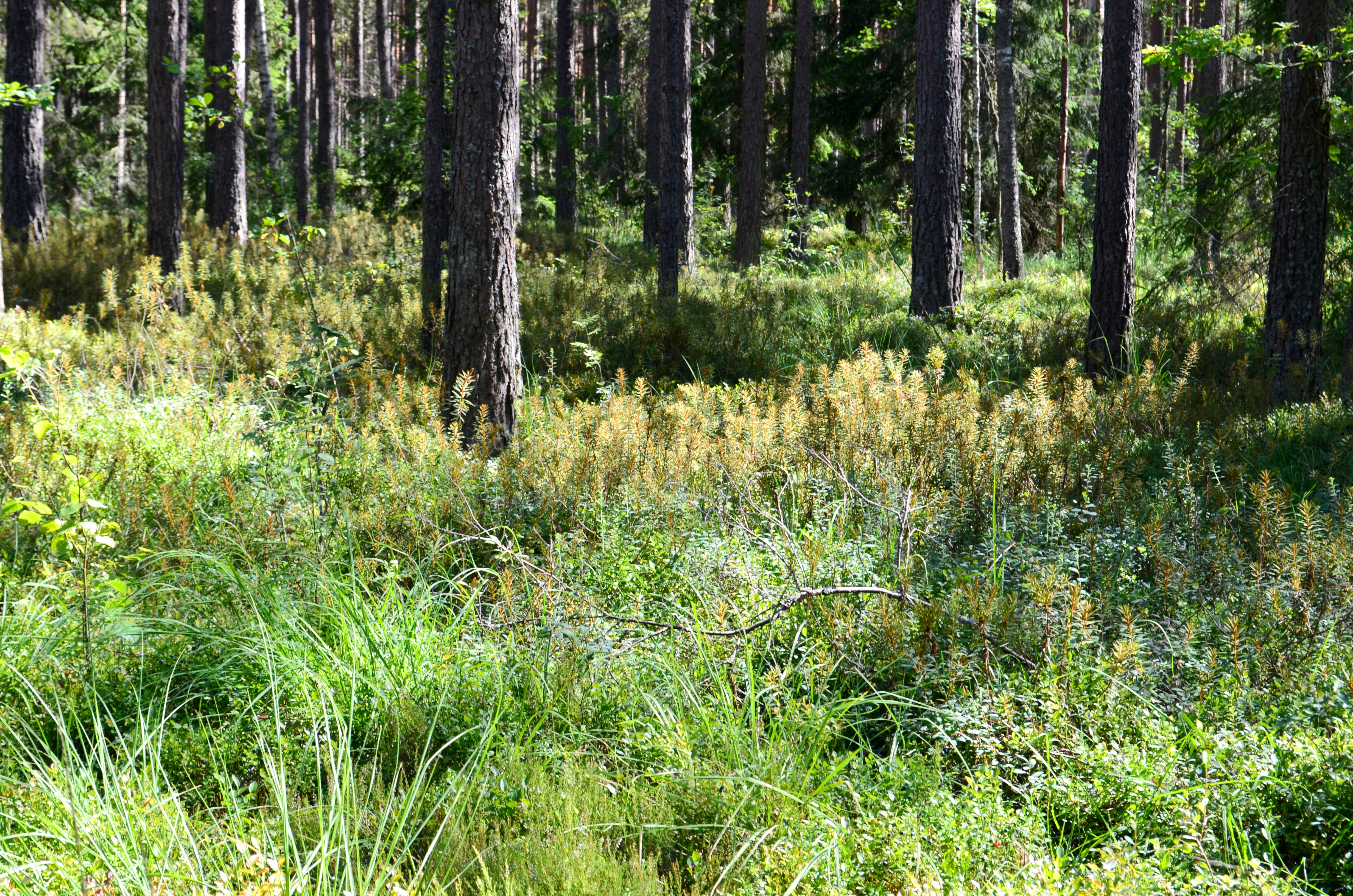 Dainavos girioje pelkė, Musteikos apylinkės, Varėnos r.